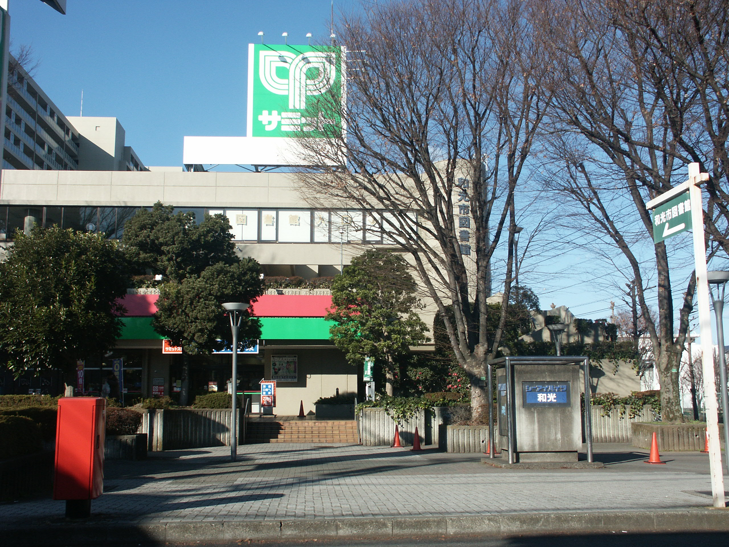 和光市図書館（３F）が設けられている建物